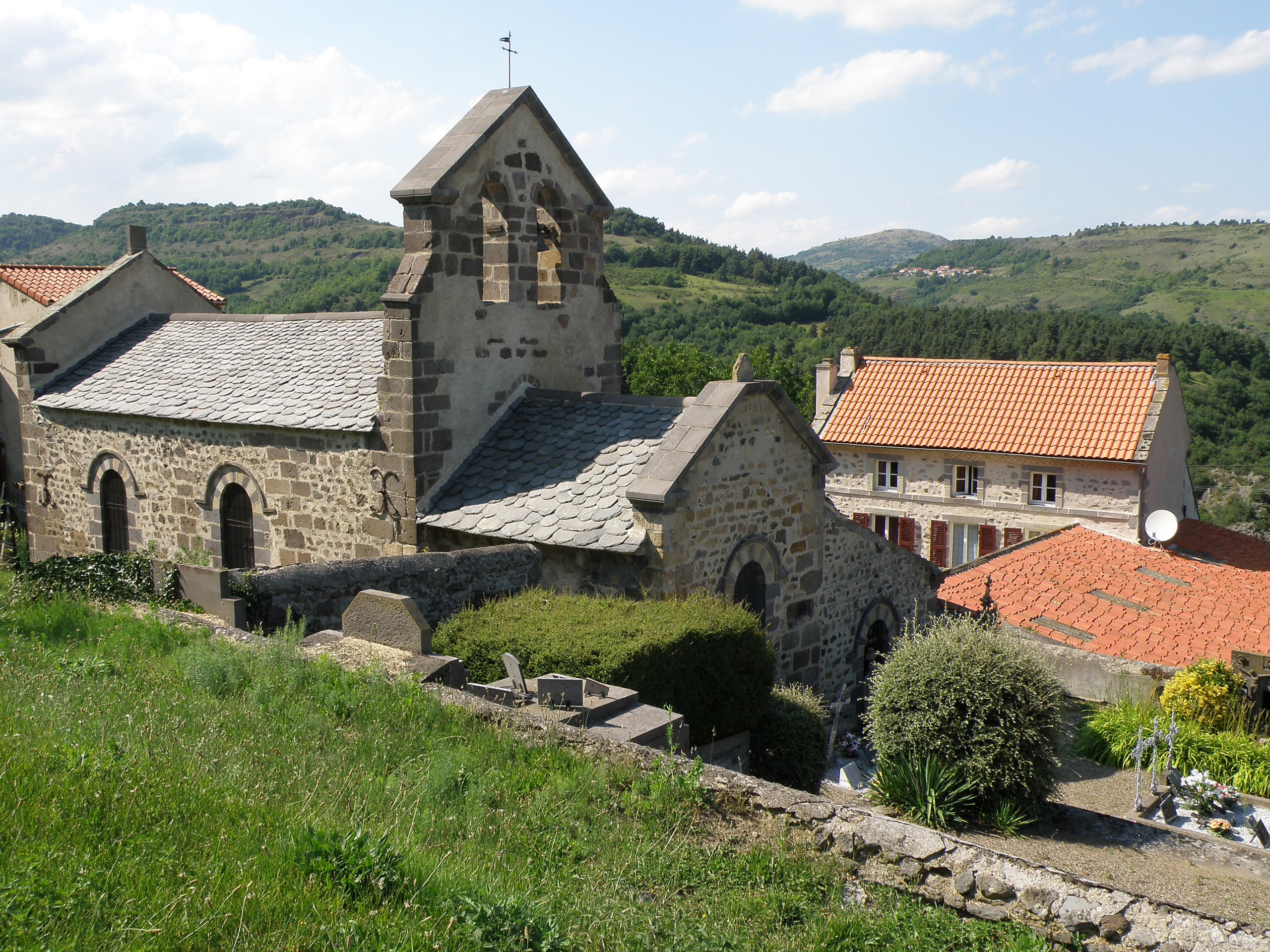 Grandeyrolles, comm. du Puy-de-Dôme (Auvergne, France). Église romane Saint-Loup (fin XIe) ; le groupe de maisons accroché à flanc de montagne dans le lointain à droite est le hameau de Chazous.